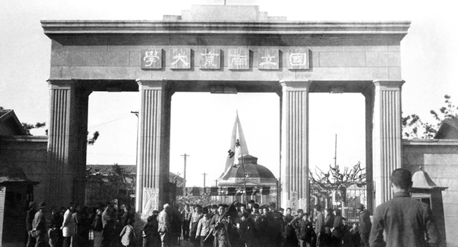 國立南京大學师生走出校园游行。